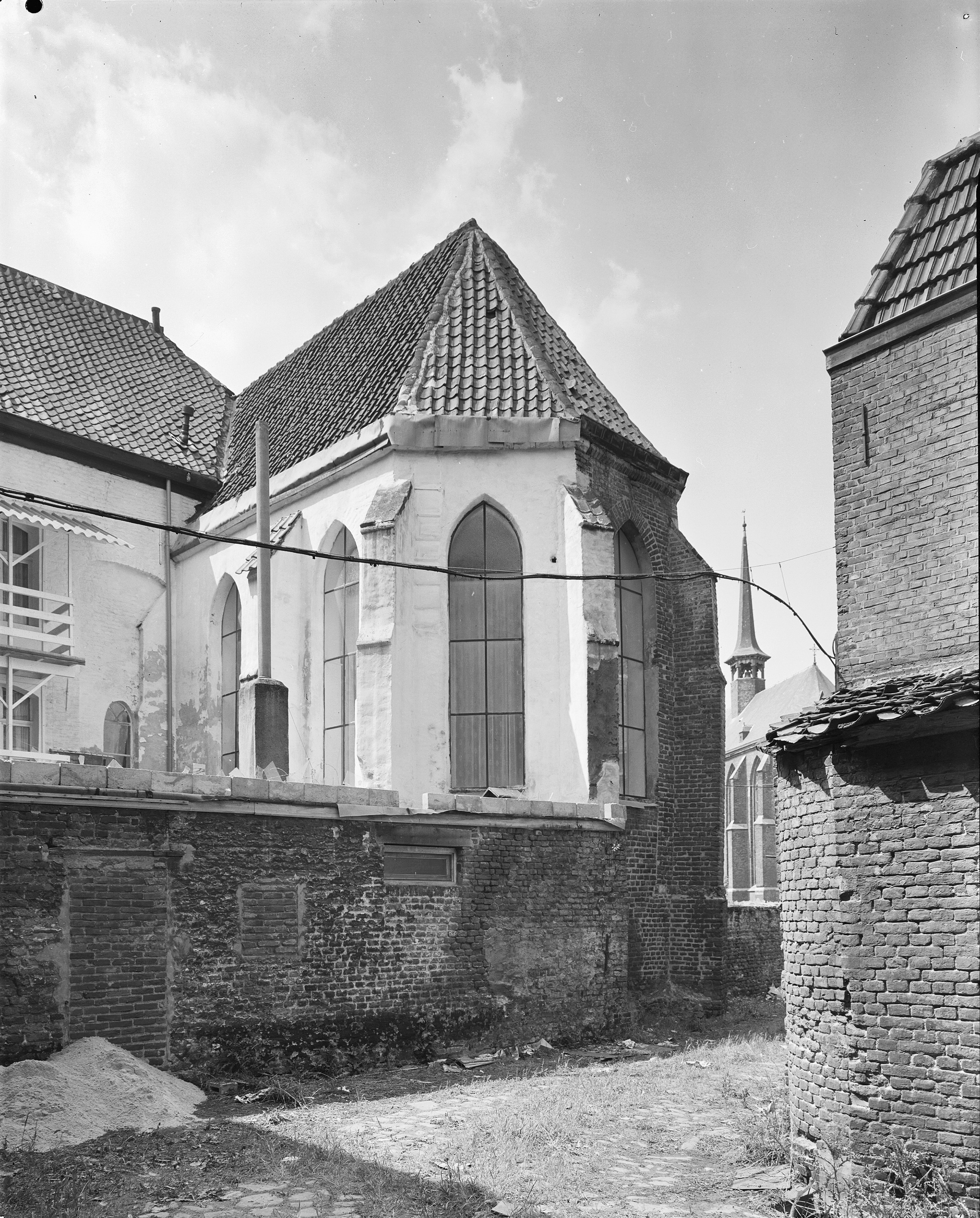 Voormalig Beggardenklooster: kapel